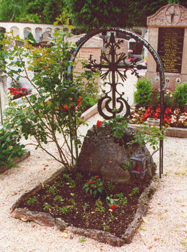 Friedrich Grassau-Willy Reichert